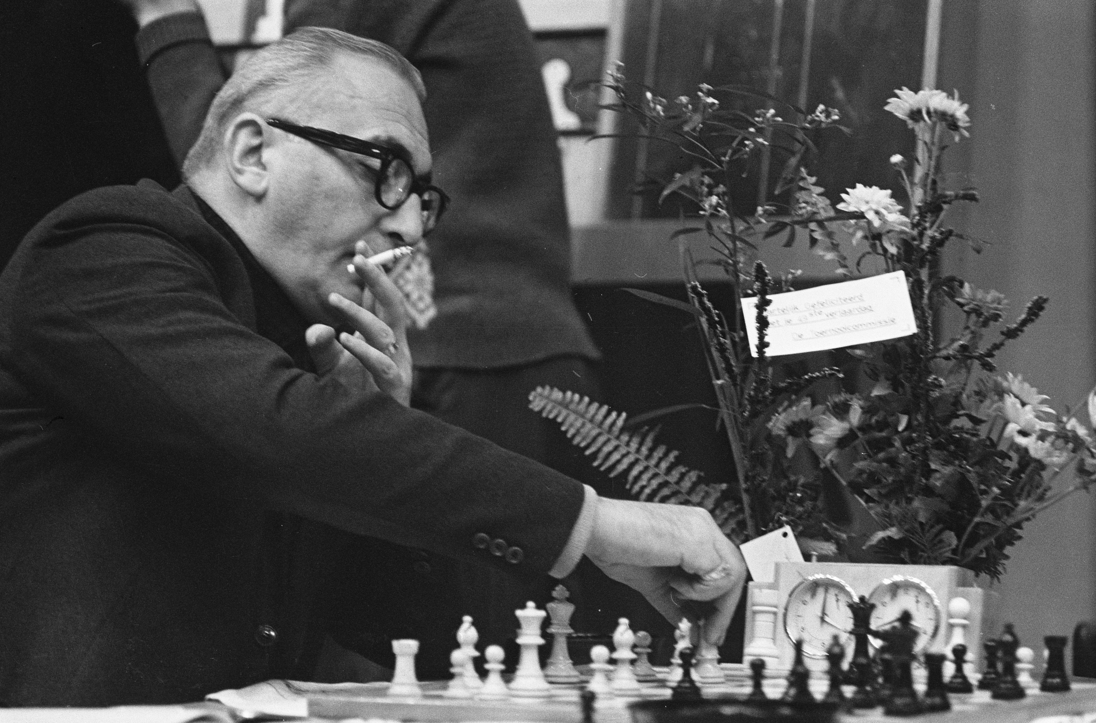 Hoogovenschaaktoernooi. De grootmeester H. Pilnik.